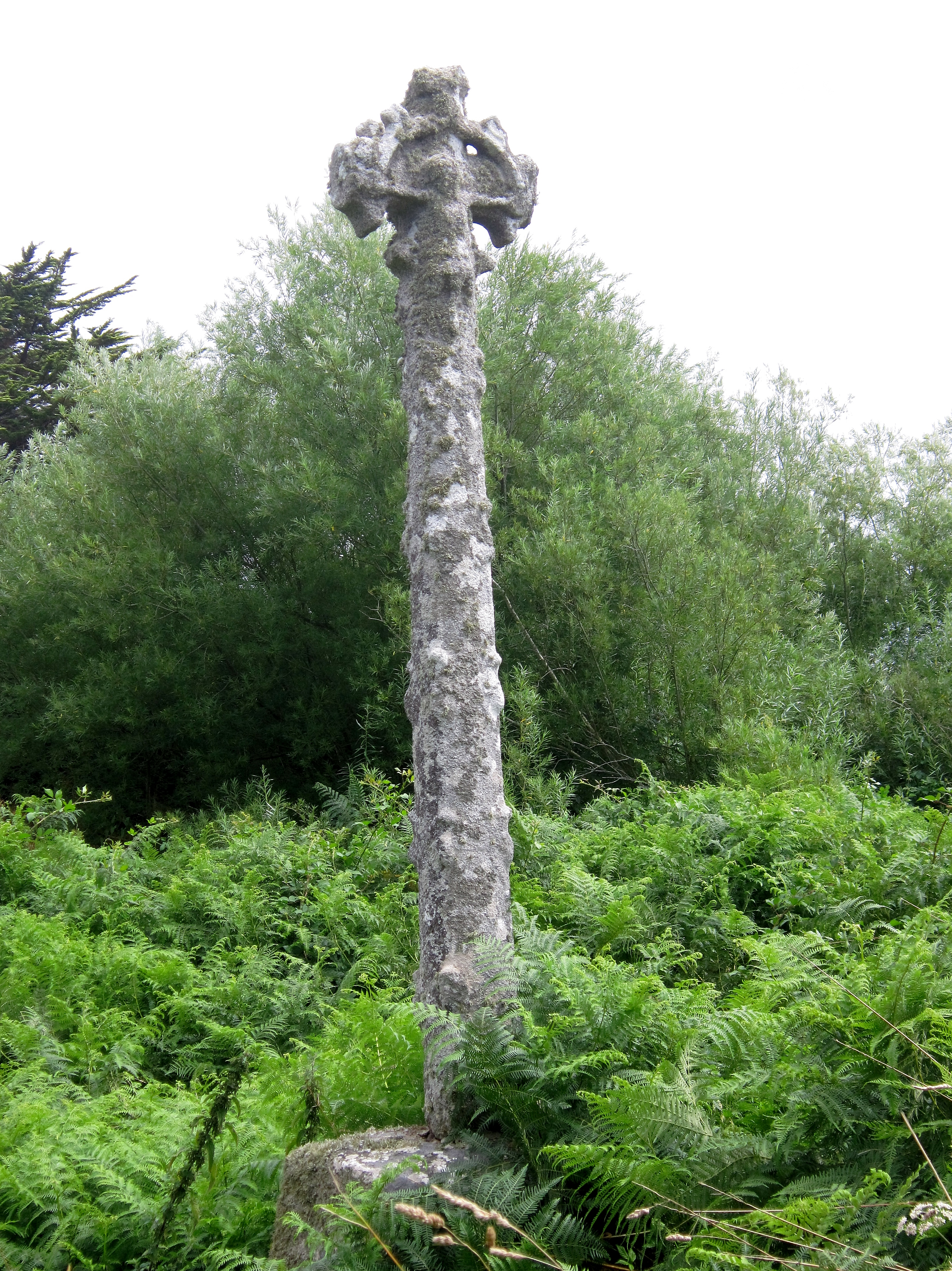 Mahalon : le calvaire de Stang Irvin (le fût de ce calvaire du XIIIe siècle porte des écots, qui symbolisent les larmes versées lors d'une épidémie (de peste?) ; le Christ est surmonté d'un rinceau en accolade qui repasse de l'autre côté pour auréoler un saint Christophe qui porte le Christ sur ses épaules, comme un sac, peut-être parce que la traversée de cette vallée marécageuse était alors difficile) [d'après une notice d'information touristique qui se trouve sur place].